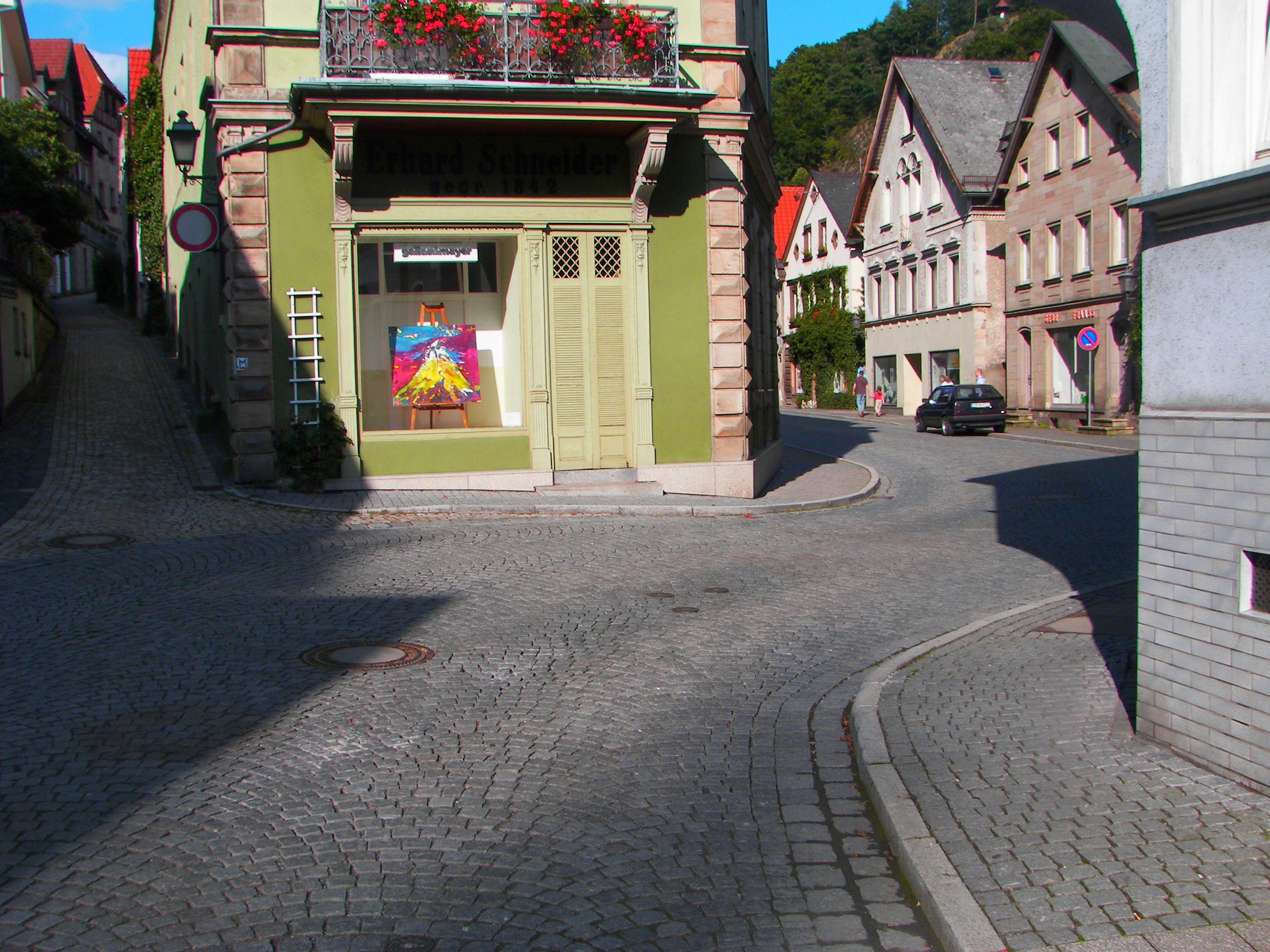 Engstelle in der Ortsdurchfahrt der B 2 in Bad Berneck